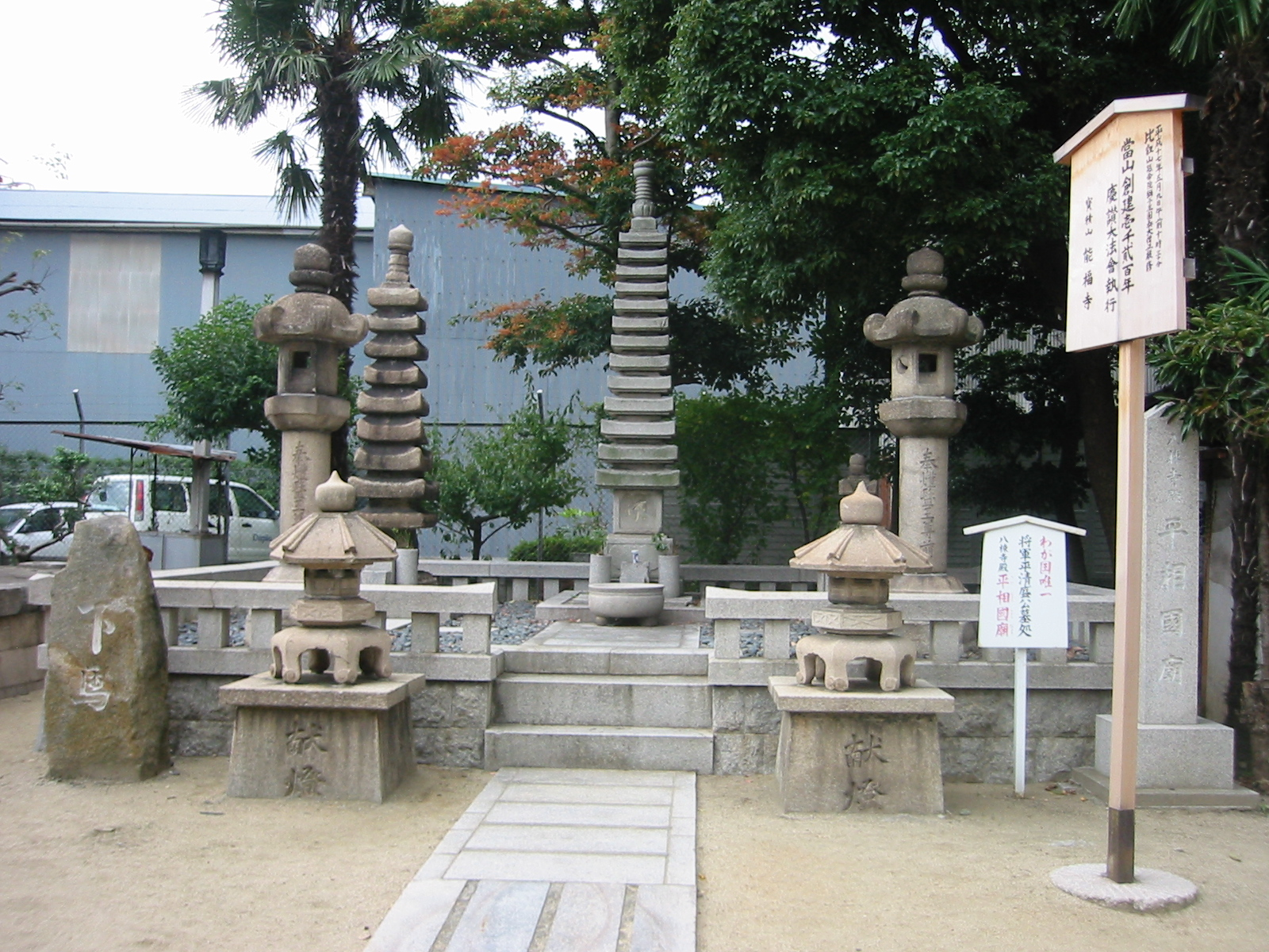 神戸の平清盛の墓、平相國廟(へいしょうこくびょう)、十三重塔（じゅうみえとう）。Taira no Kiyomori tomb